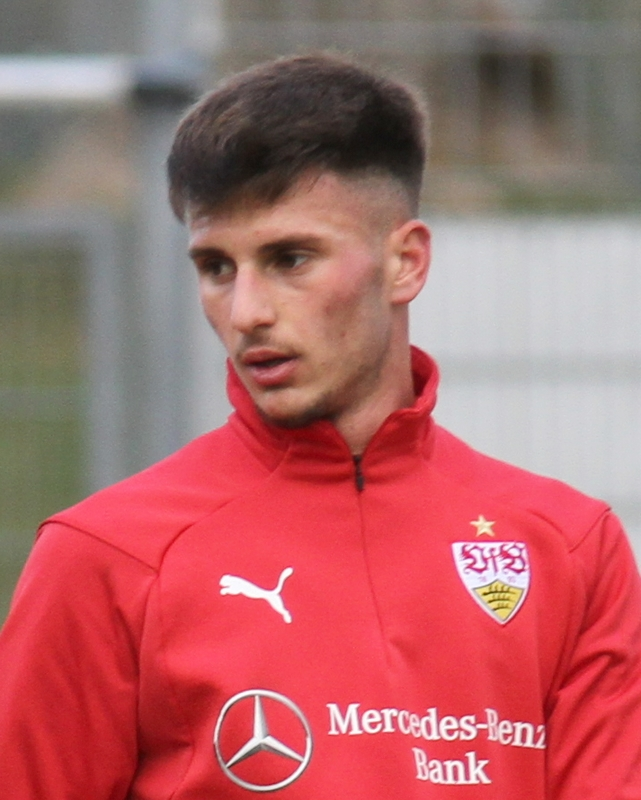 Leon Dajaku beim VfB-Training. Aufgenommen von